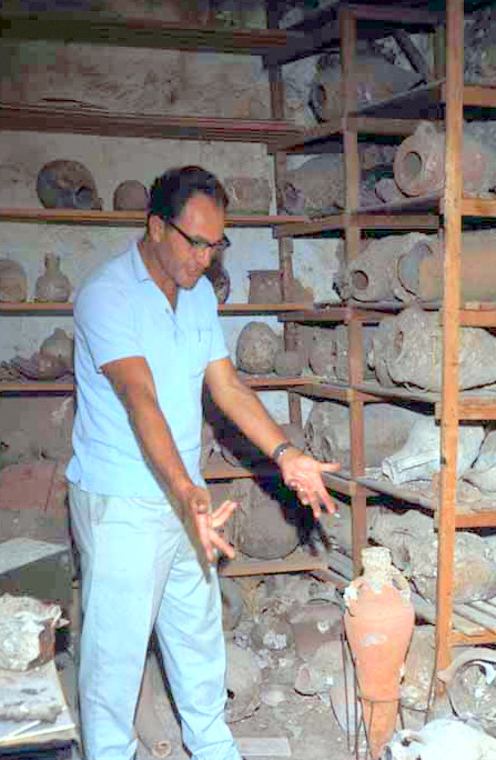 אלישע לינדר במוזיאון מעגן מיכאל